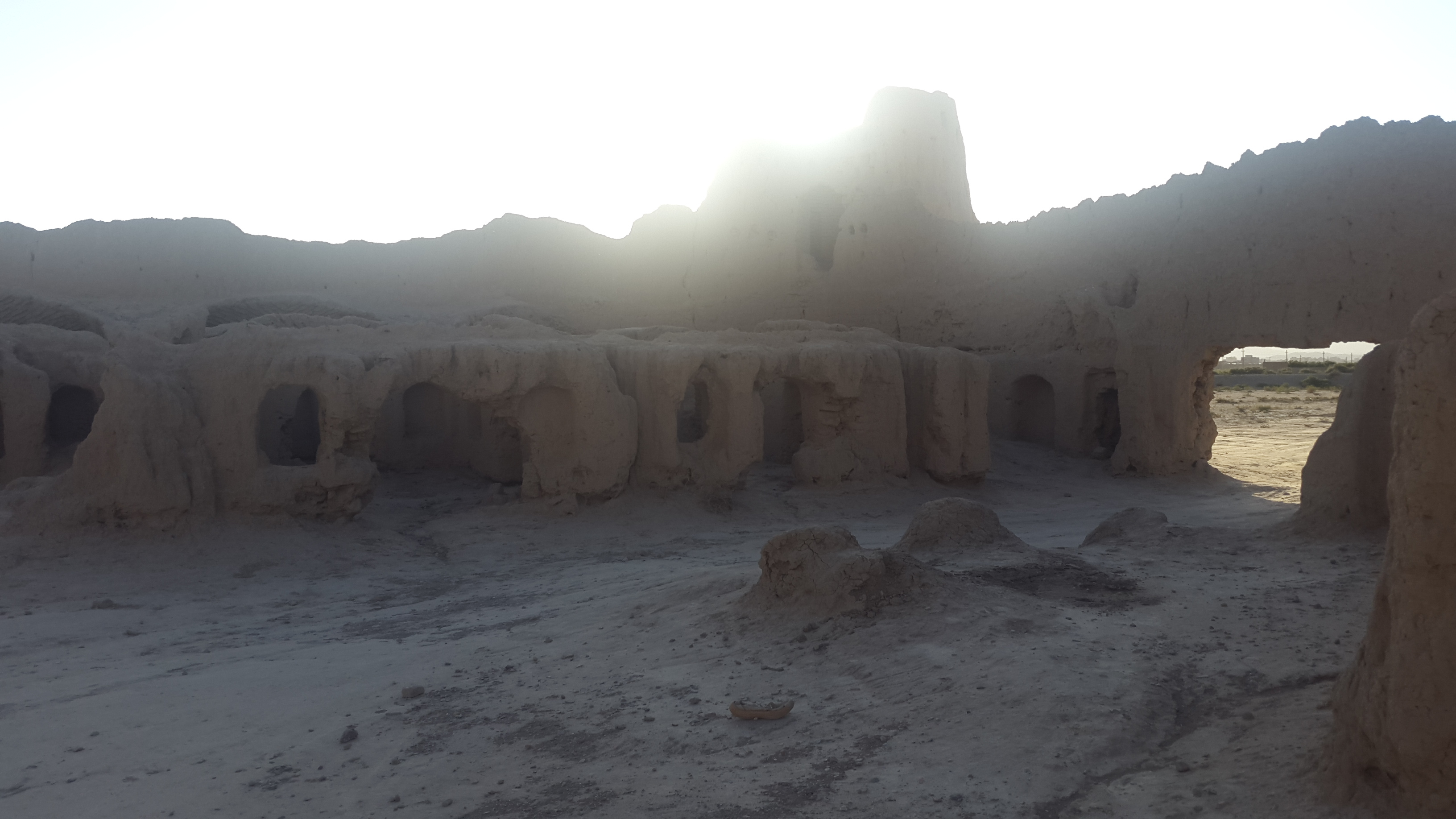 تپه حصار و کاخ ساسانی